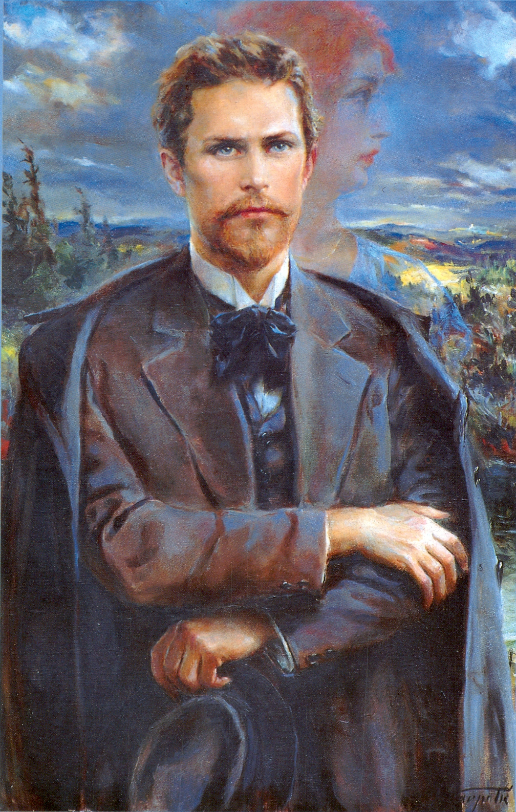 Dragotin Kette z »njegovo« nikoli doseženo Angelo v ozadju.